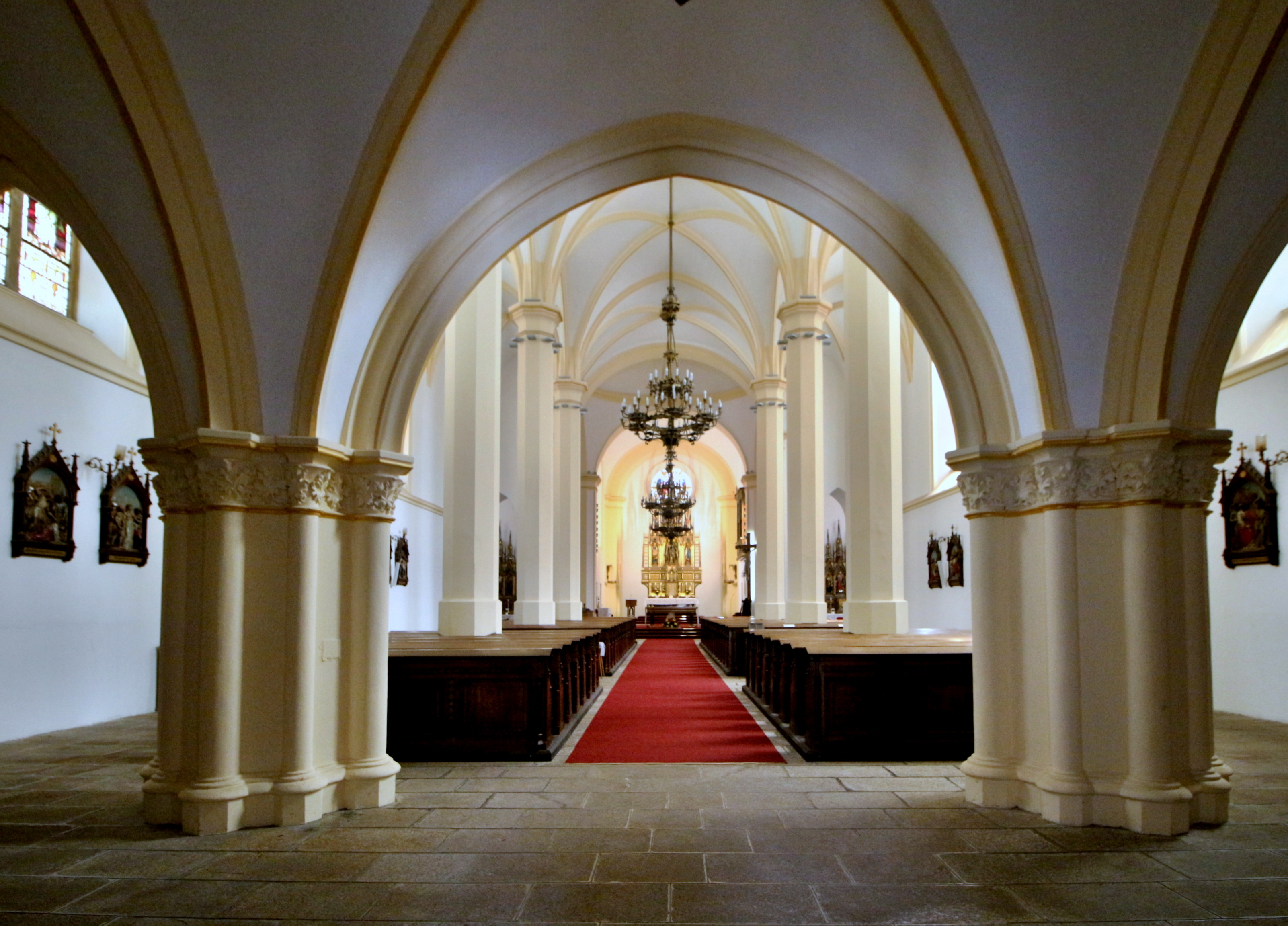 Liberecký kostel svatého Antonína Velikého